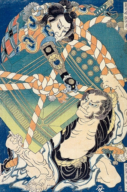 Onikojima Yatarō and Saihōin Akabōzu (鬼児嶋弥太郎 西法院赤坊主)